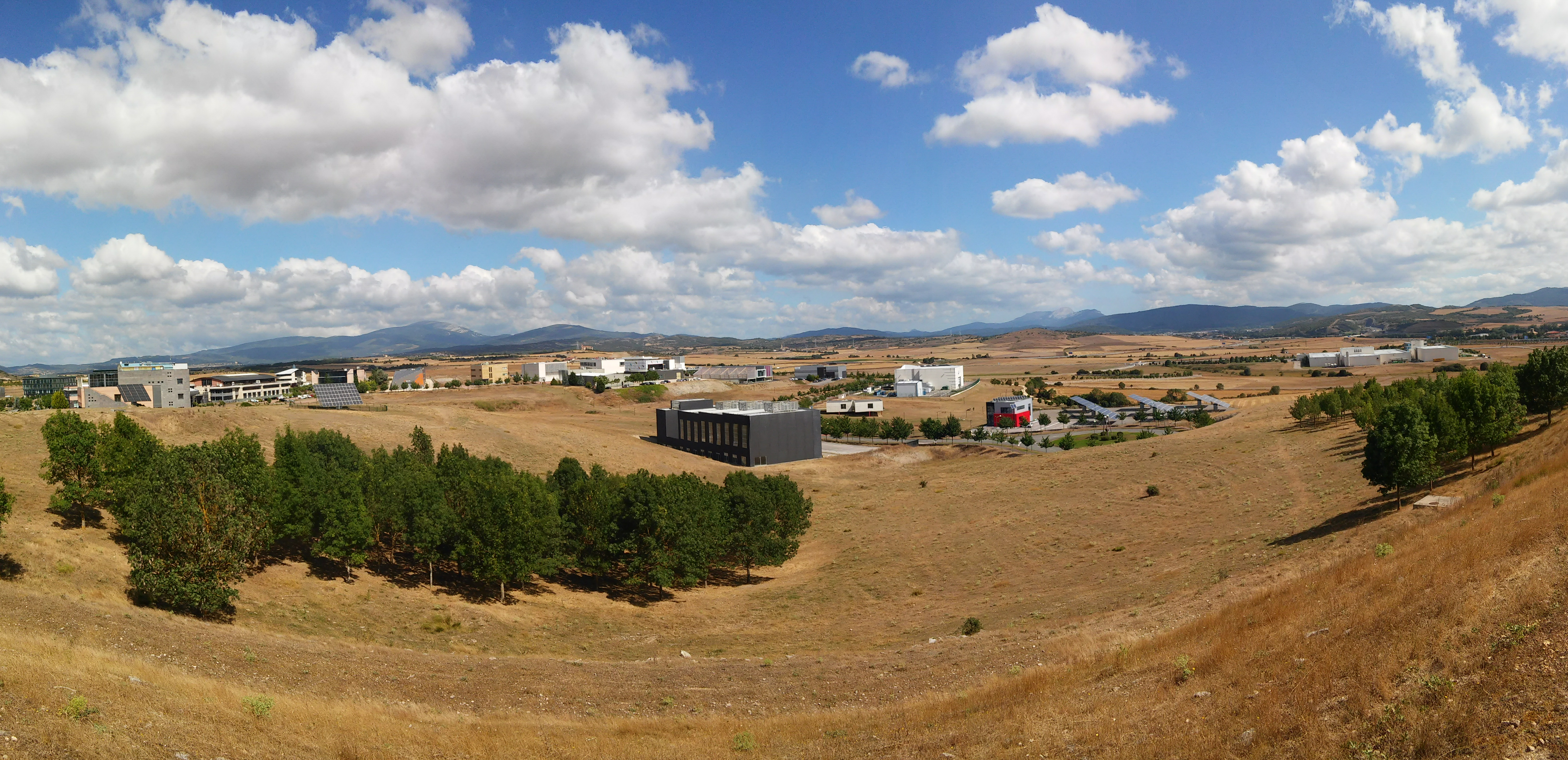 Arabako Teknologia Parkea (Miñao, Gasteiz)